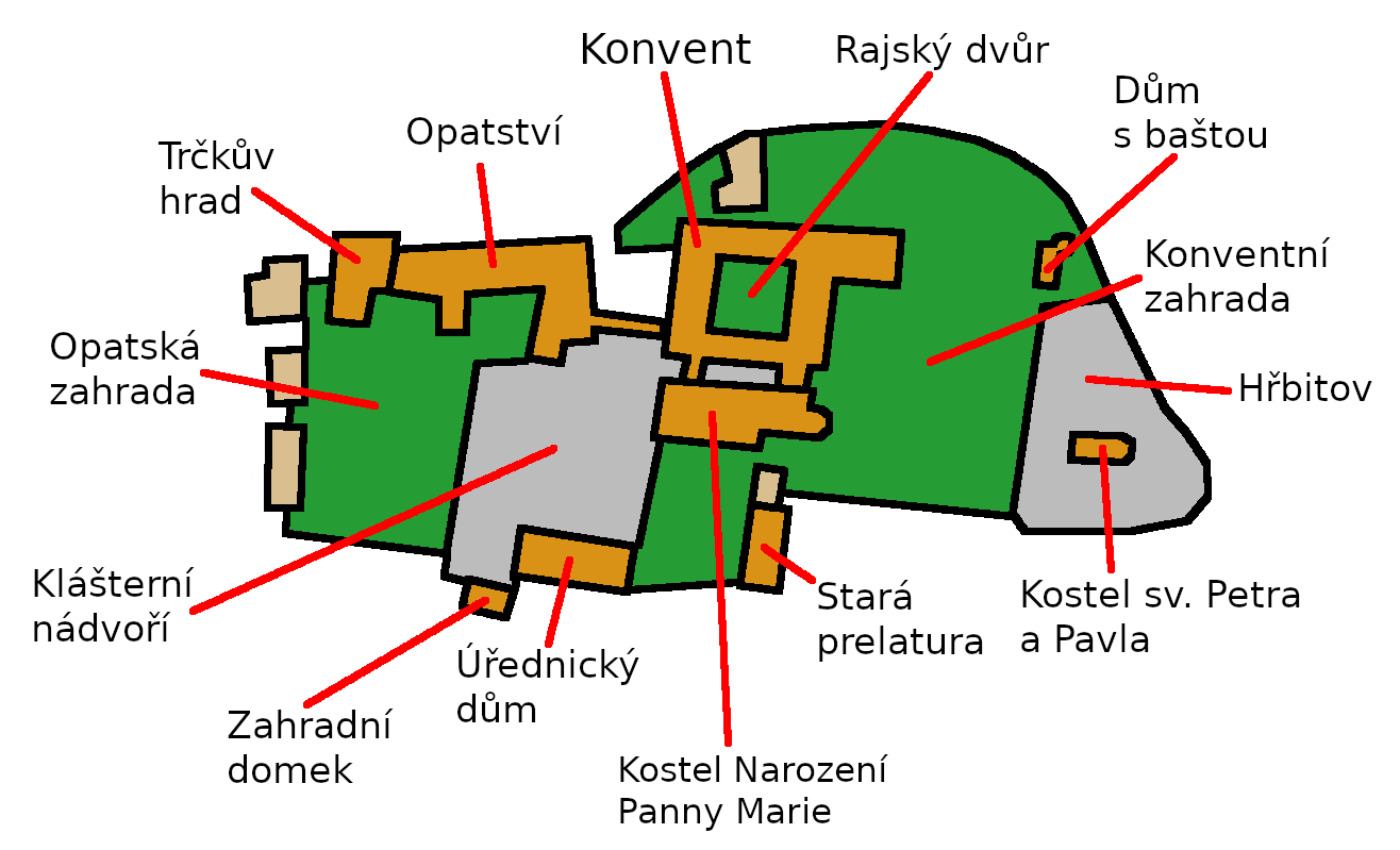 Plánek kláštera Želiv vytvořený podle informační tabule v areálu kláštera